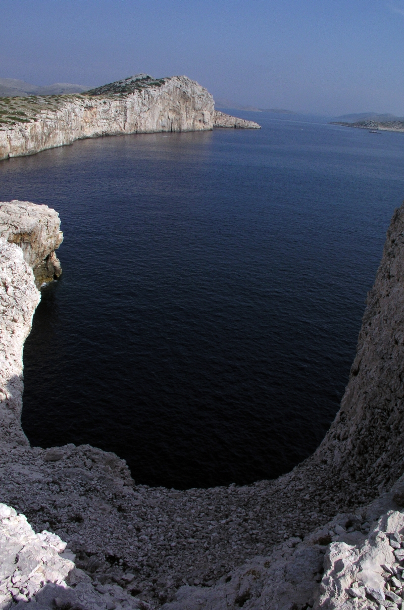 Mana, Kornati, Croatia